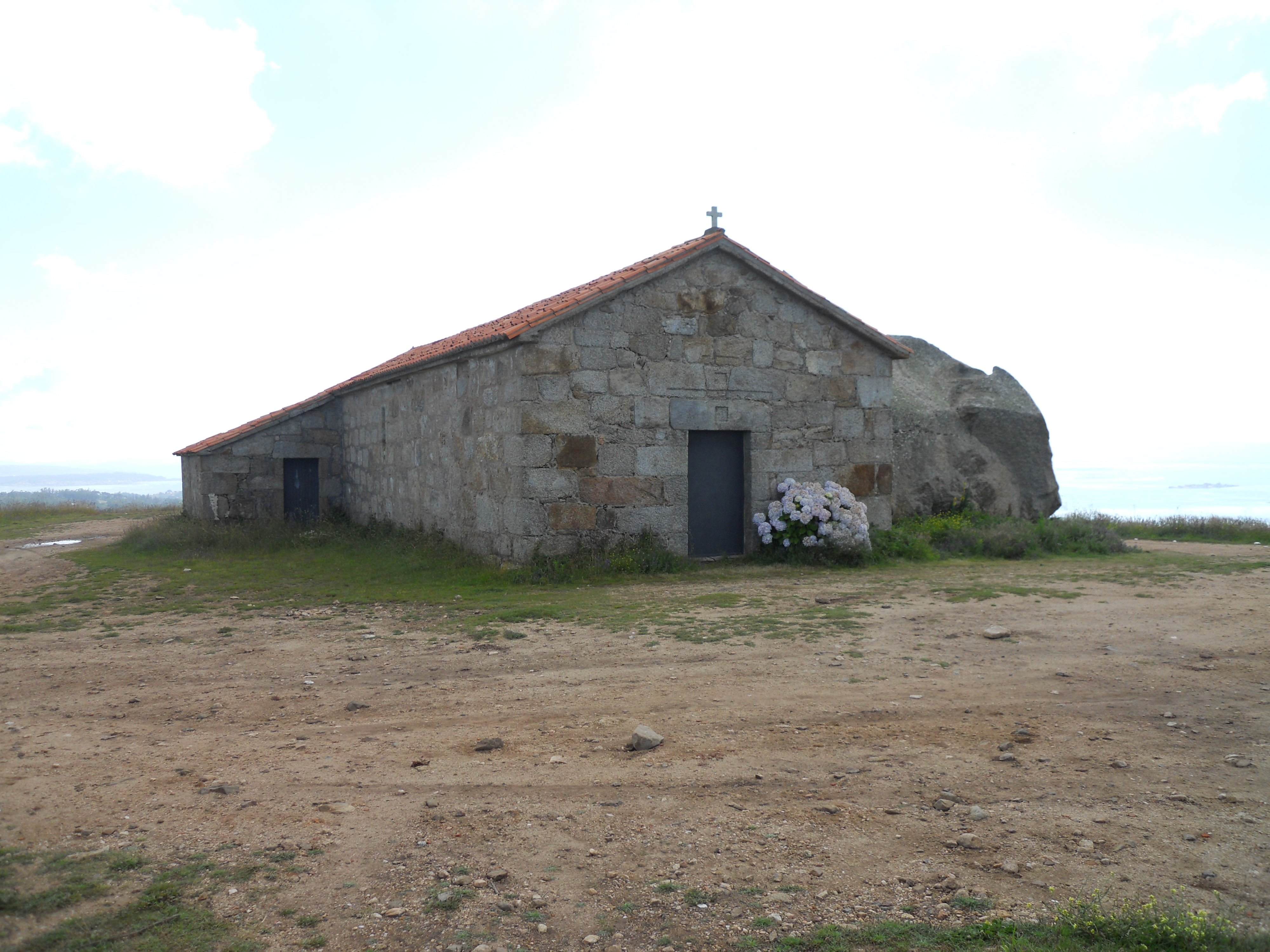 Ermita de San Alberto de Artes